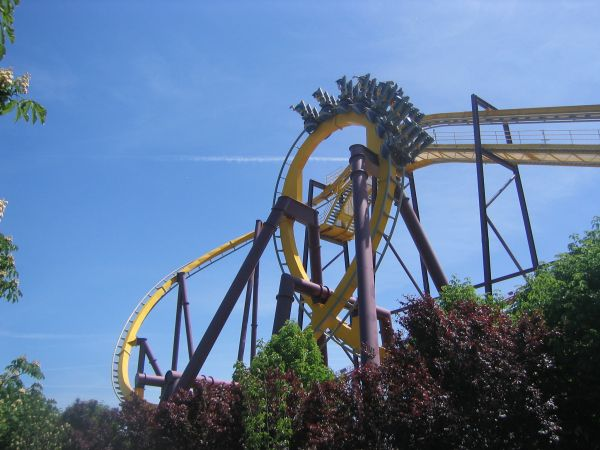 Vsita de la montaña rusa de Parque Warner, Batman, La Fuga